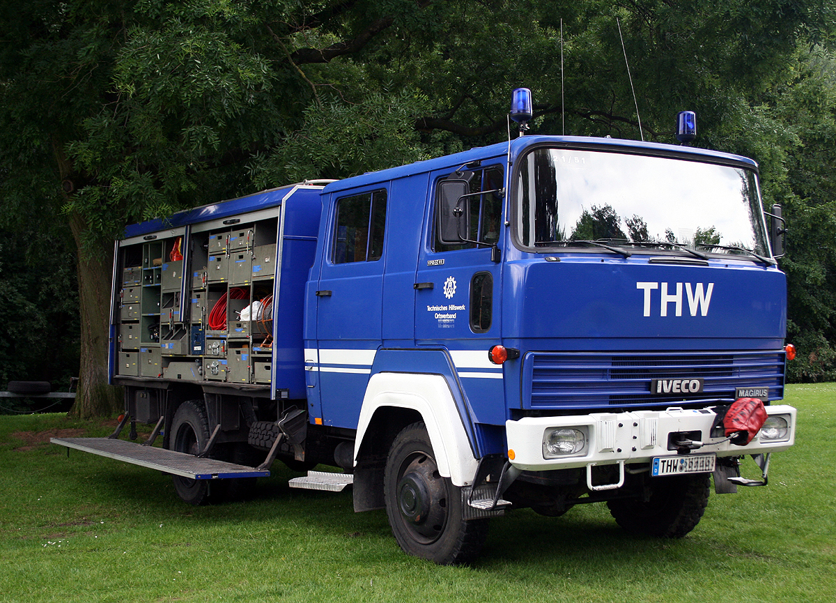 Iveco Magirus 170D11